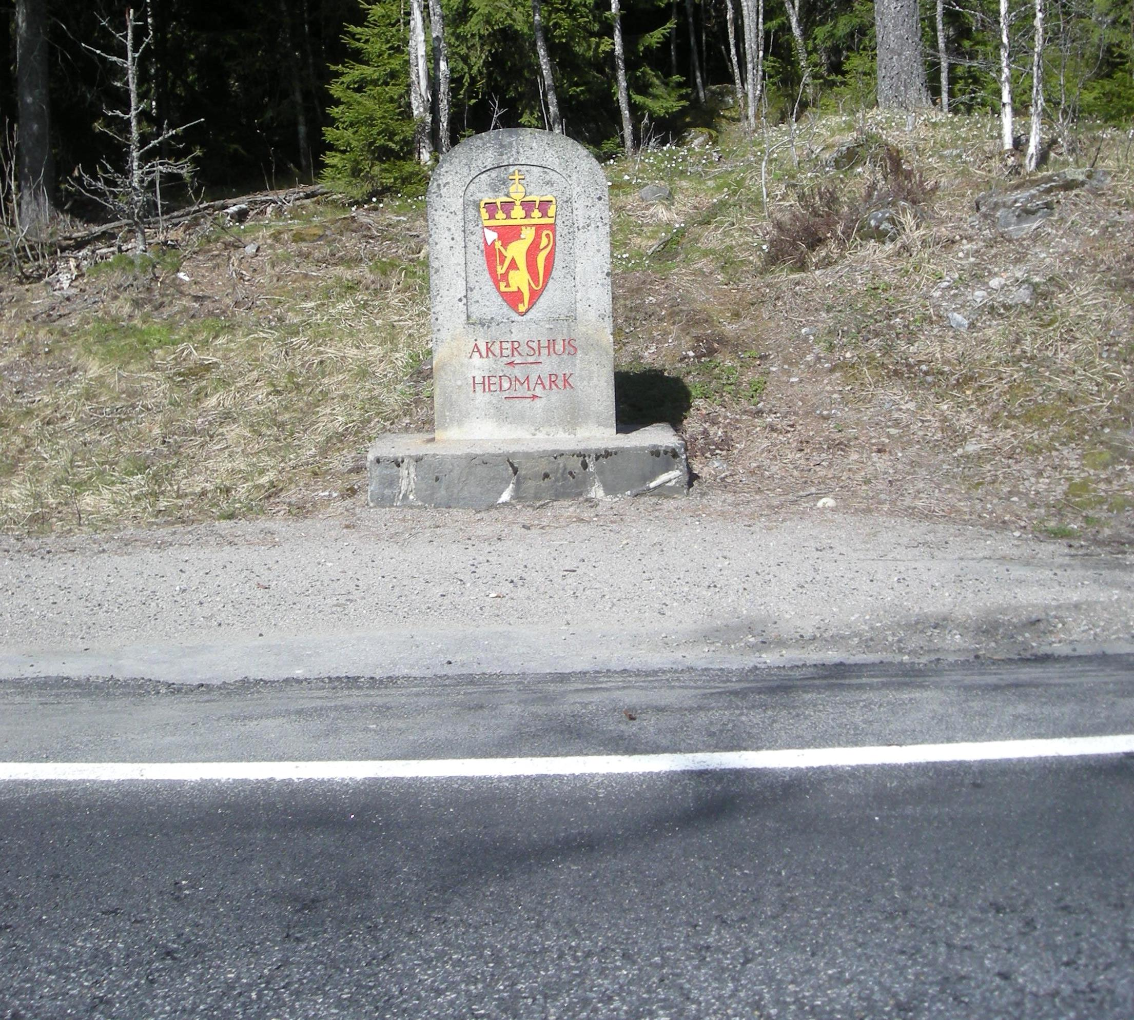 Grensestein mellom Aurskog-Høland og Eidskog (Akershus og Hedmark) langs primær fylkesvei 21 (tidligere riksvei 21)